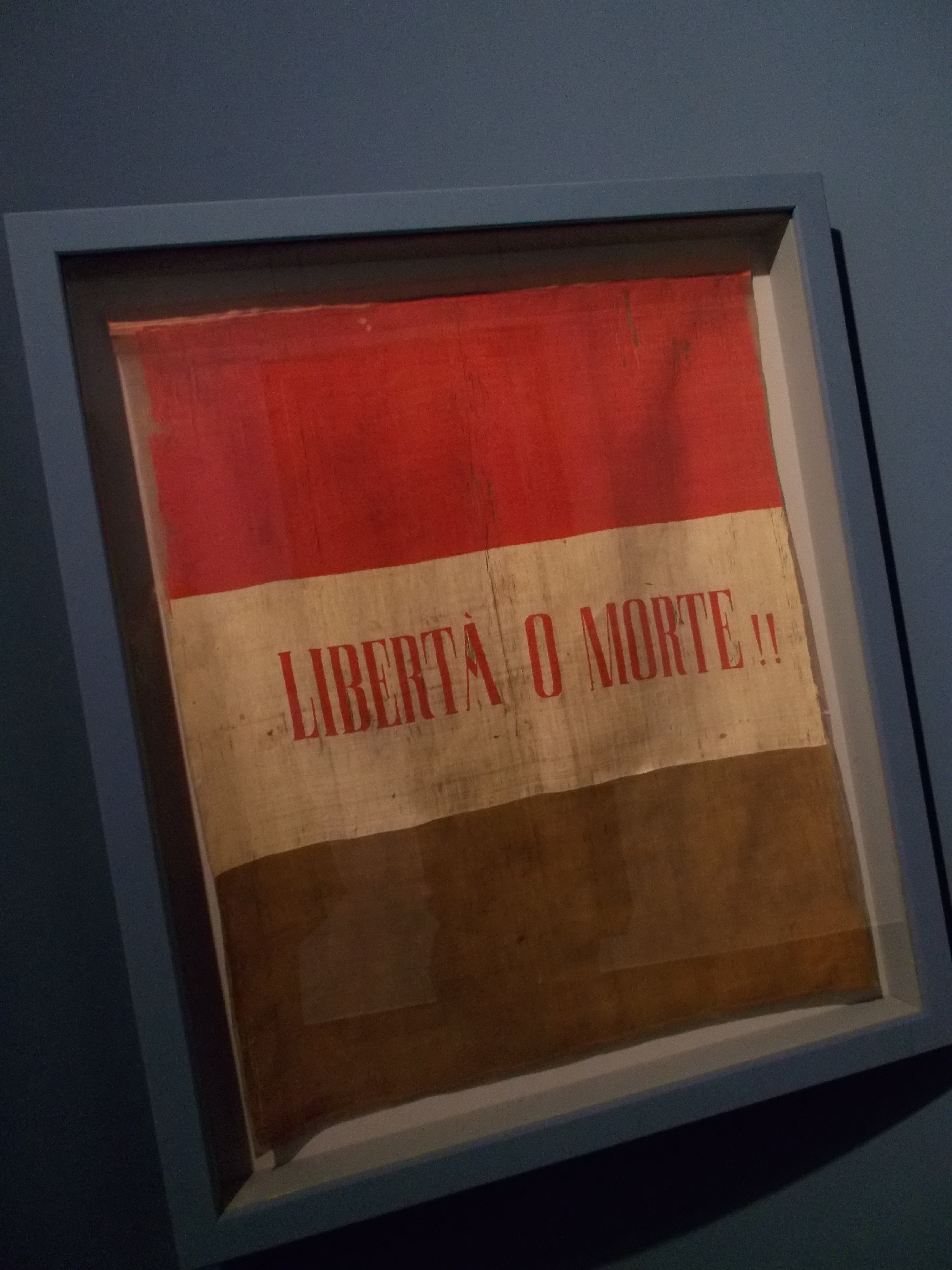 Museo Risorgimento e Casa natale G. Mazzini This is a photo of a monument which is part of cultural heritage of Italy.